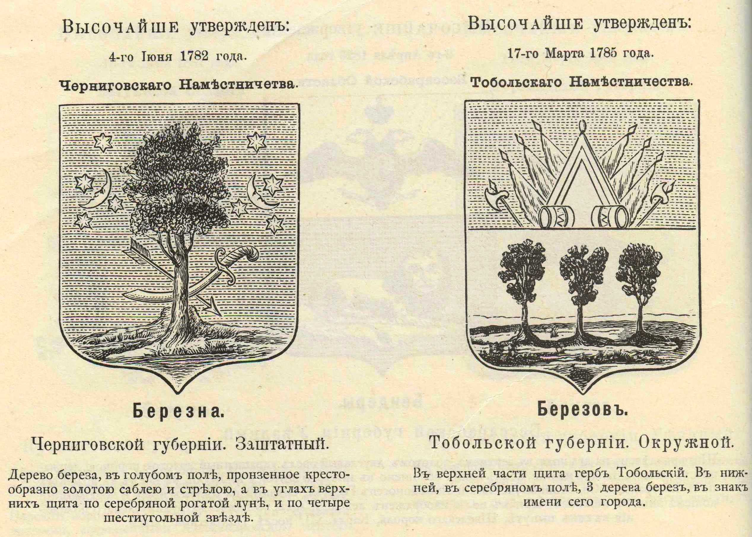 Official Russian Empire 2 canting arms Berezna, Berezov. Гласные гербы городов Российской Империи Березна Черниговской губернии, Берёзов Тобольской губернии с официальными описаниями в Гербовнике Винклера.